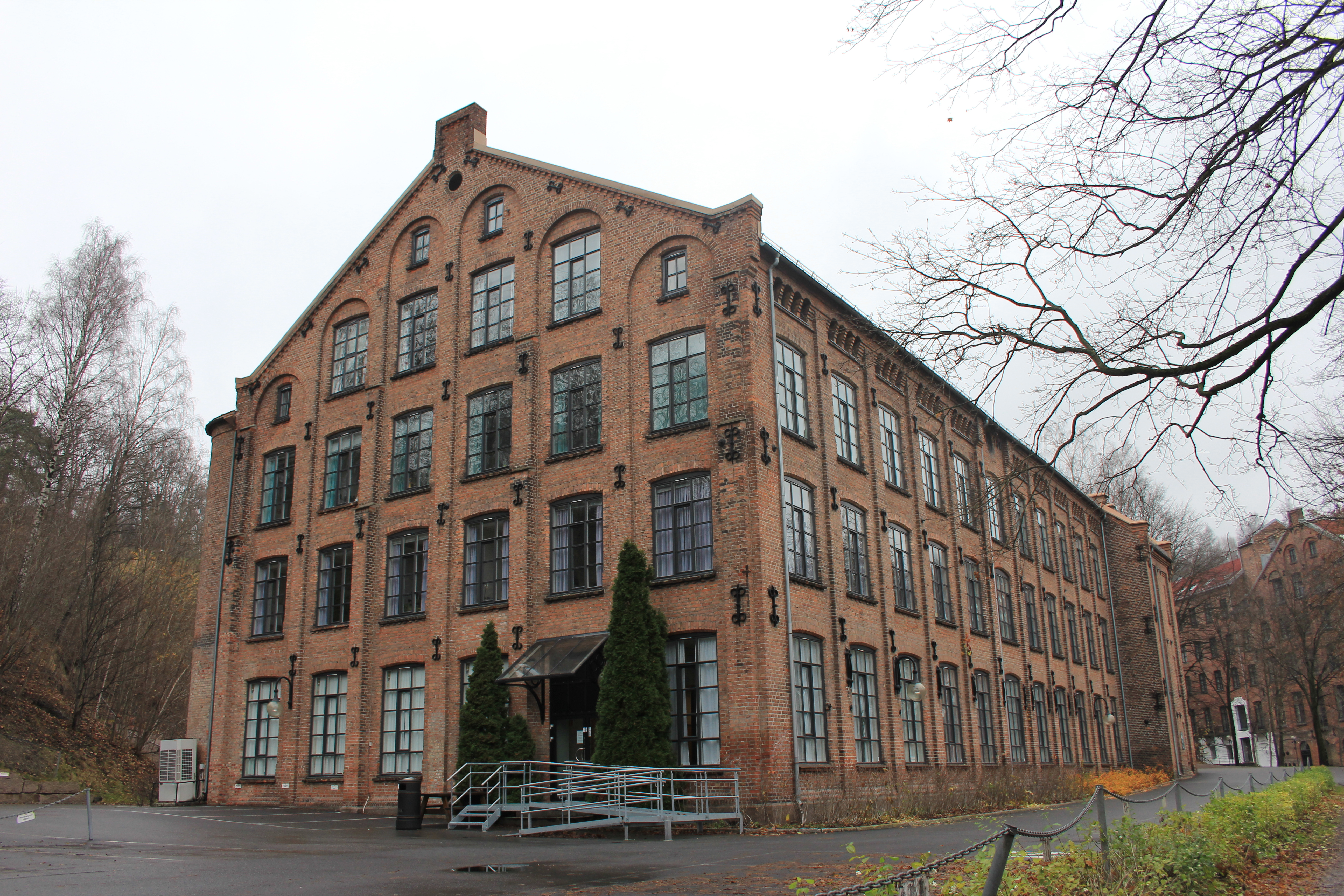 Nydalens Compagnie AS var et tekstilindustriselskap øverst i Nydalen i Oslo.